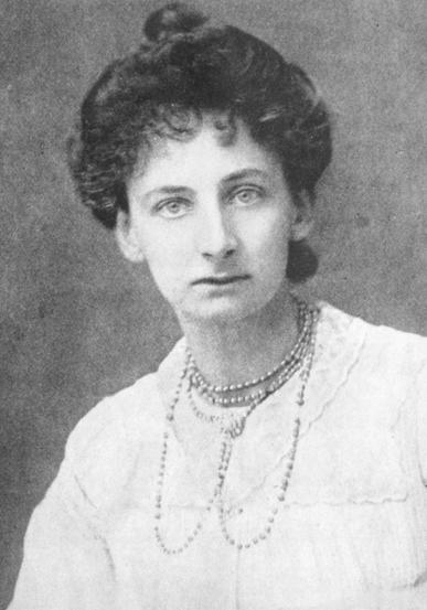 Lady Constance Georgina Bulwer-Lytton (córka Roberta Bulwera-Lyttona)